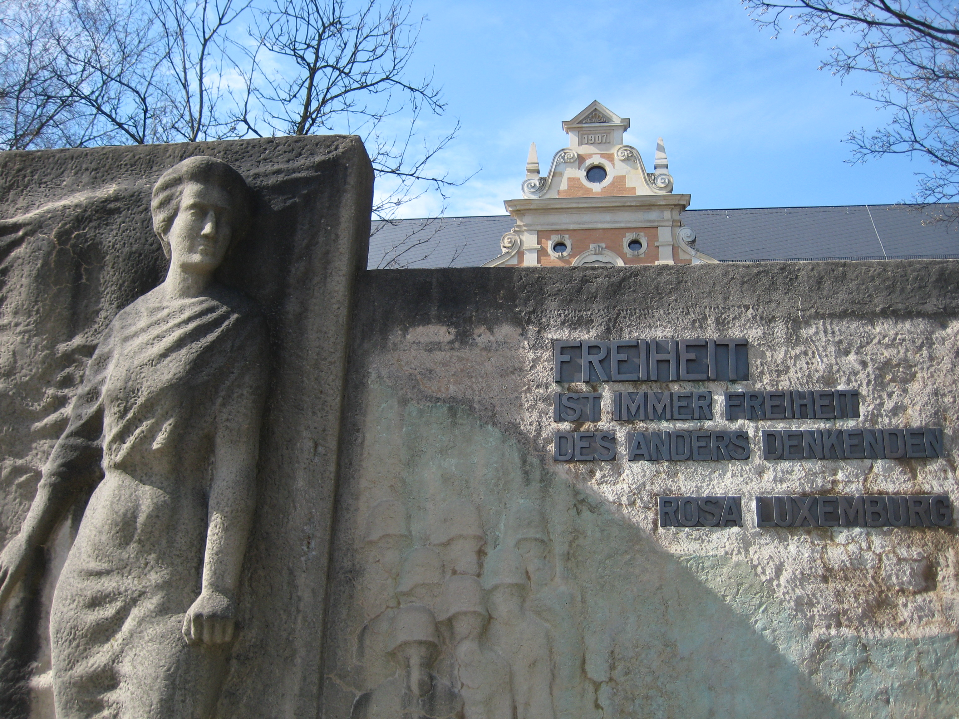 Rosa-Luxemburg-Denkmal in Zwickau (Sachsen)